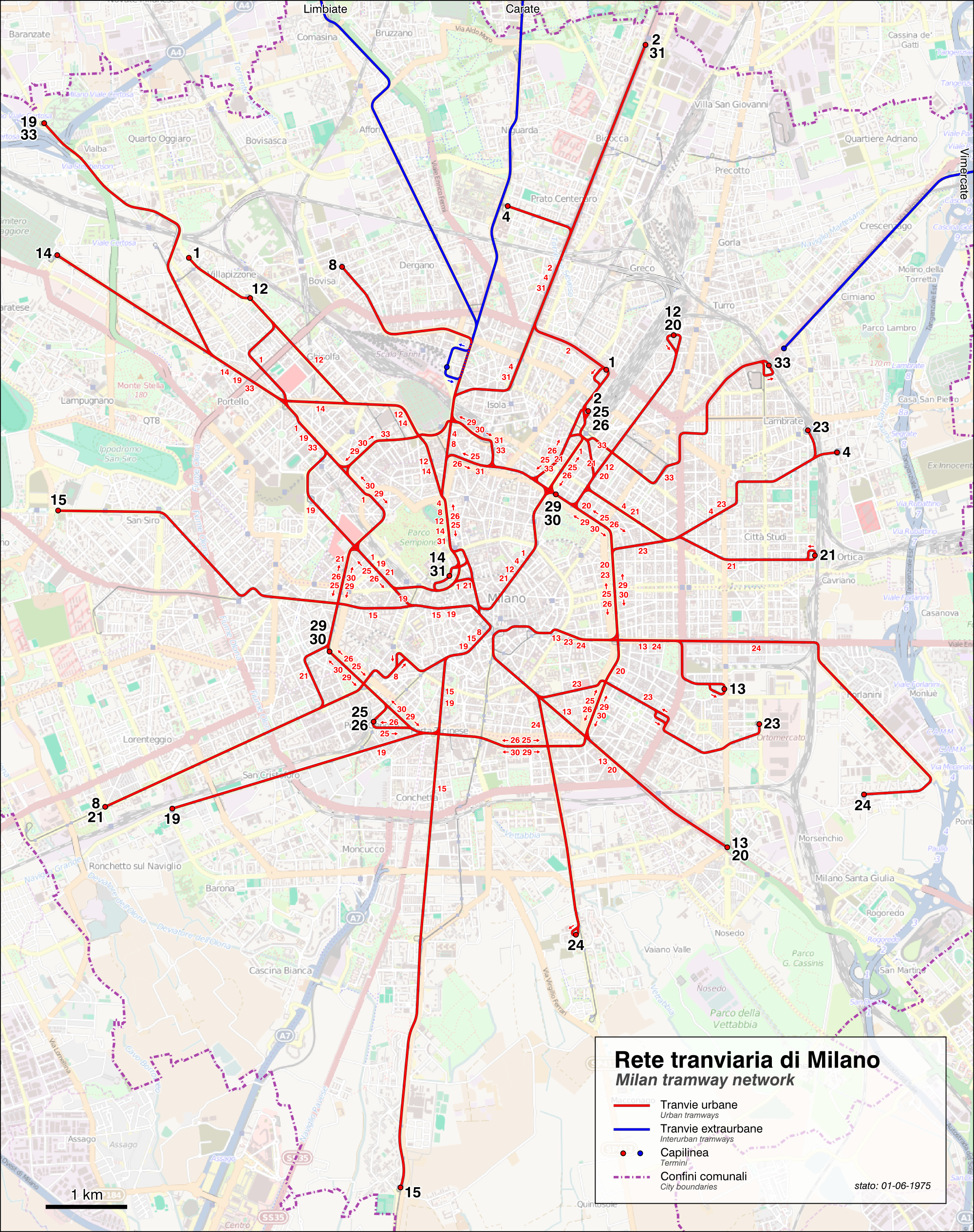 Mappa della rete tranviaria di Milano al 1° giugno 1975. Fonte: mappa dell’epoca riprodotta qui. This map may be incomplete, and may contain errors. Don't rely solely on it for navigation.